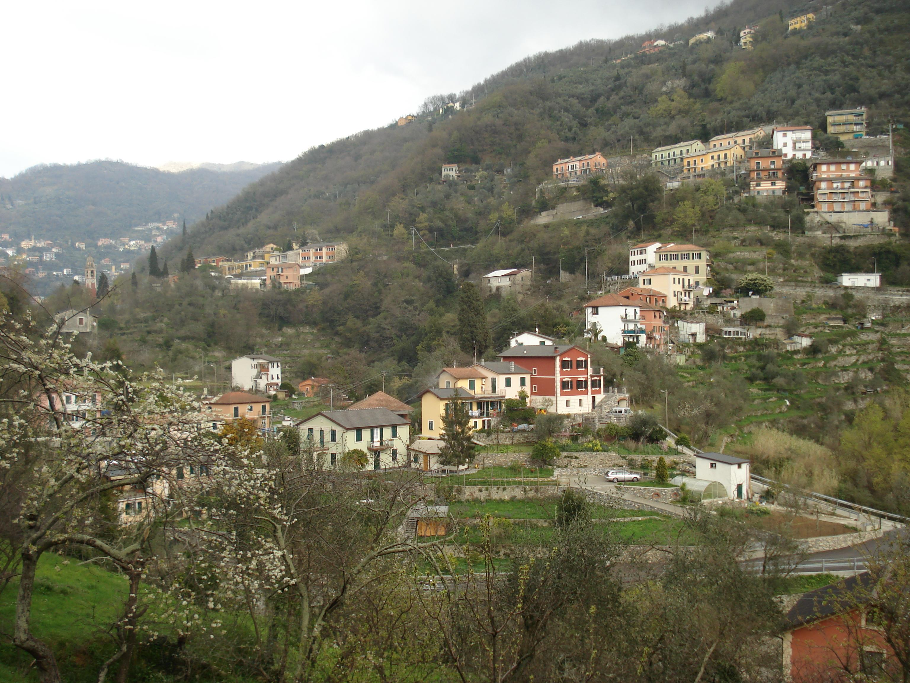 Cosmin latan,16-03-2008,Avegno